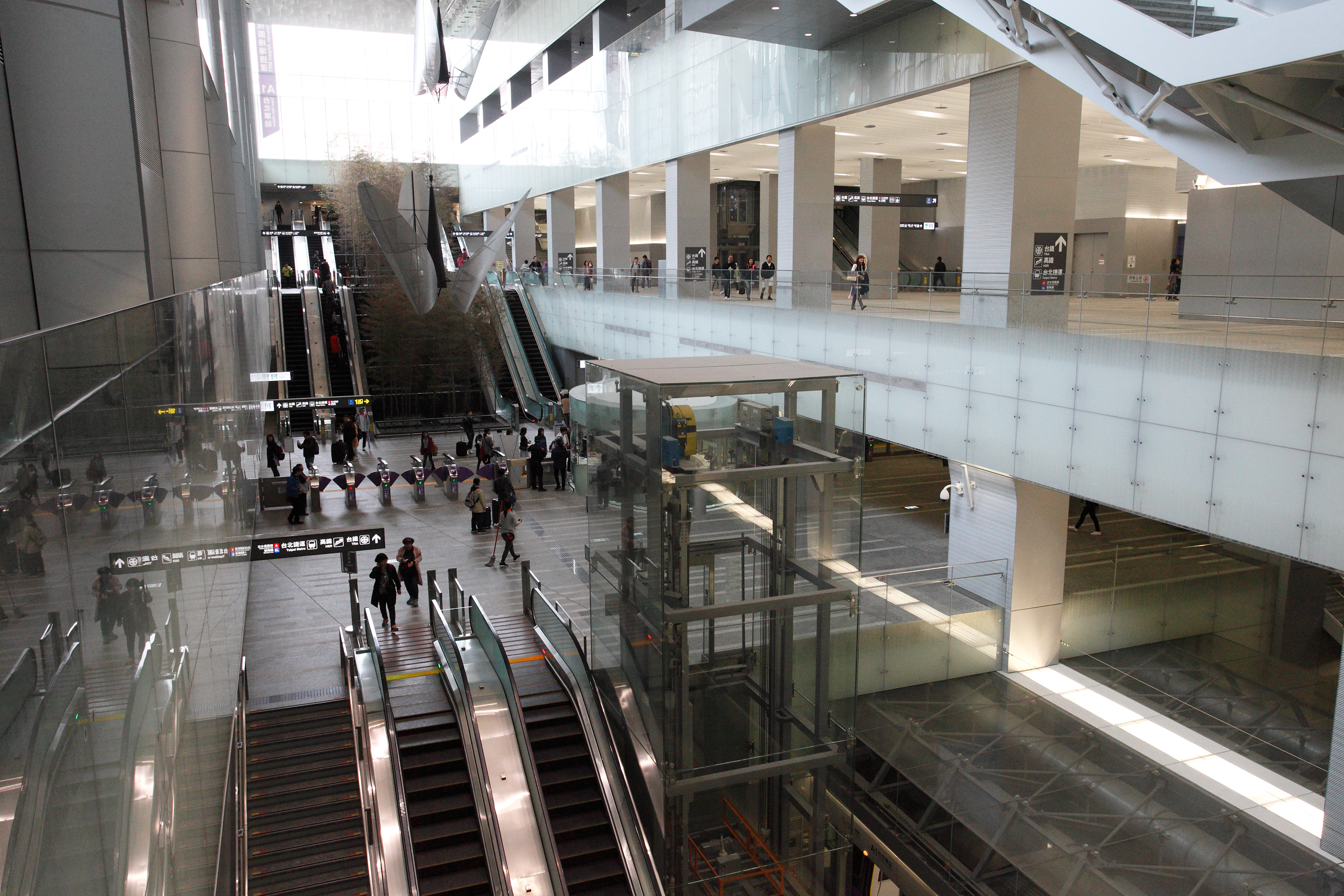 桃園捷運台北車站公共藝術《文化基因－Meme》。